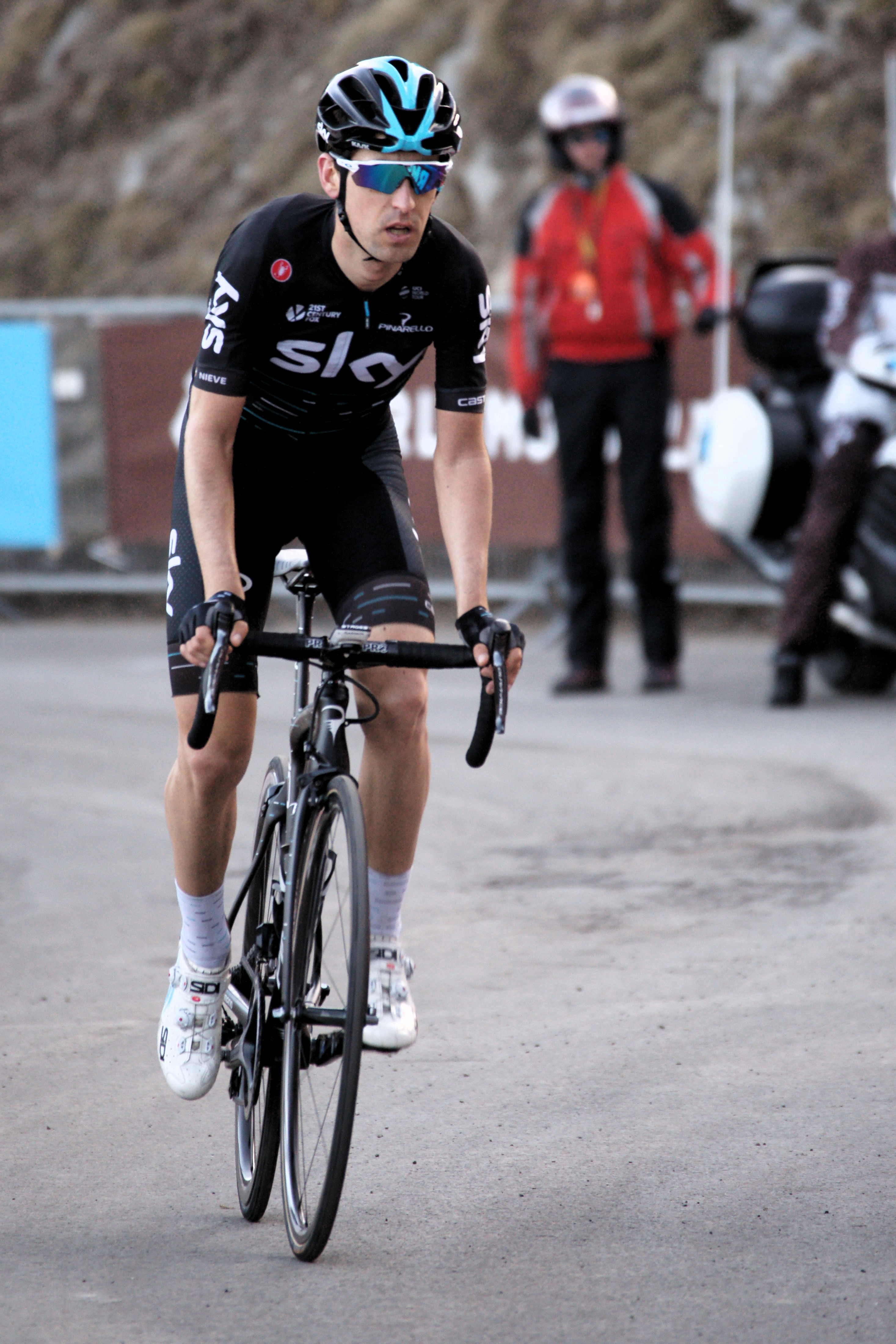 Mikel Nieve Roubion Paris-Nice 2017